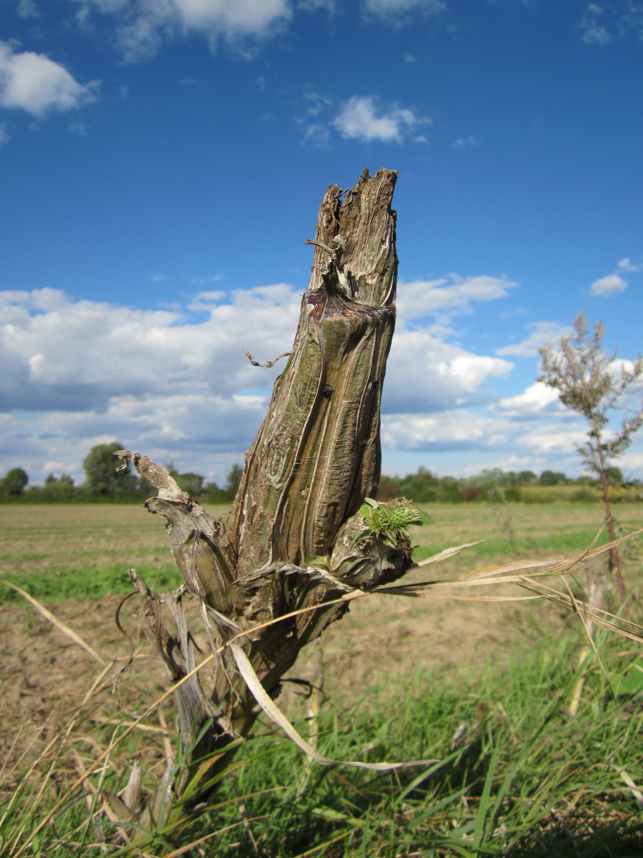 "Ruine" einer Großen Klette (Arctium lappa) im Hockenheimer Rheinbogen